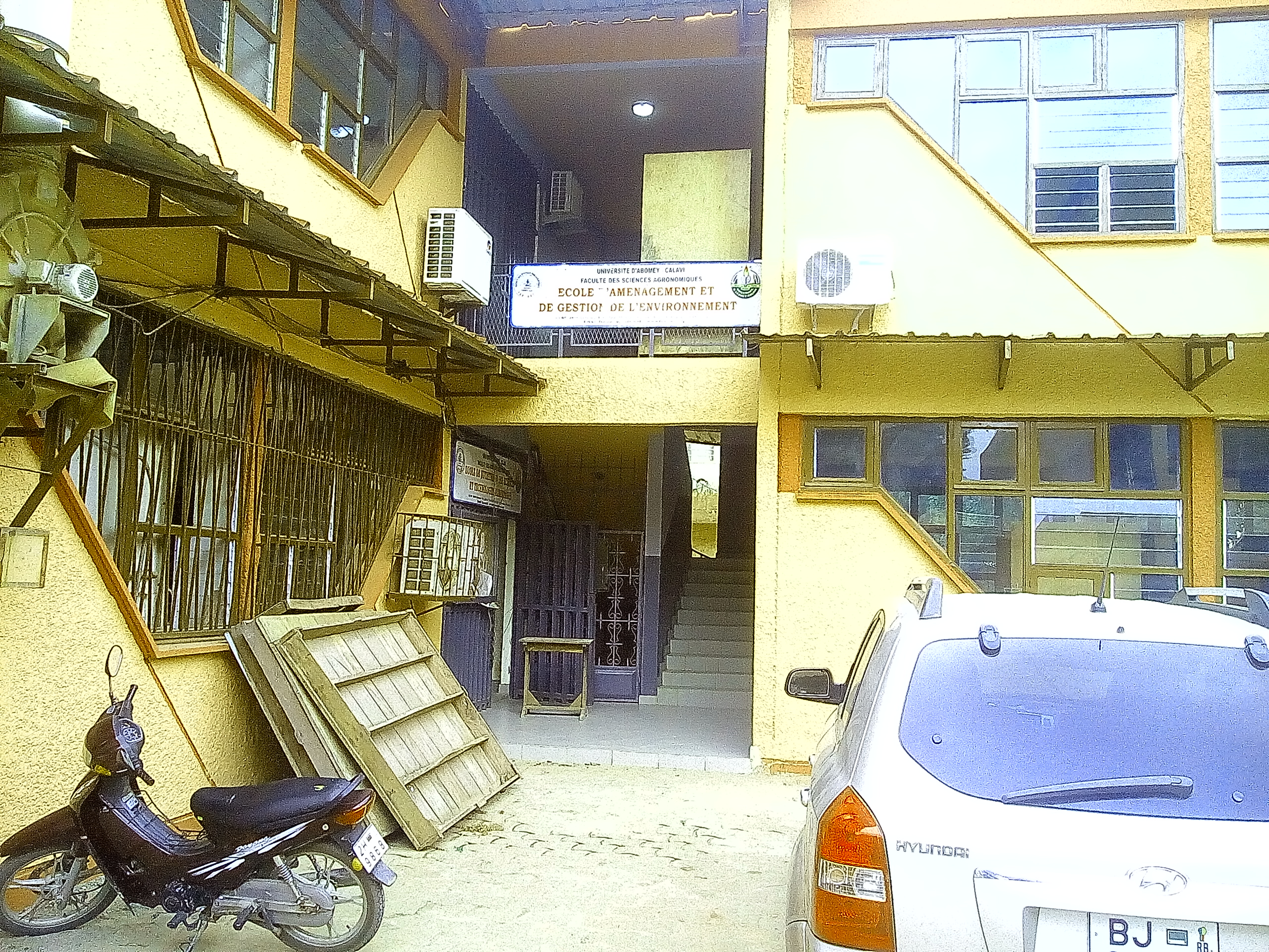 Faculté des droits et science politique.